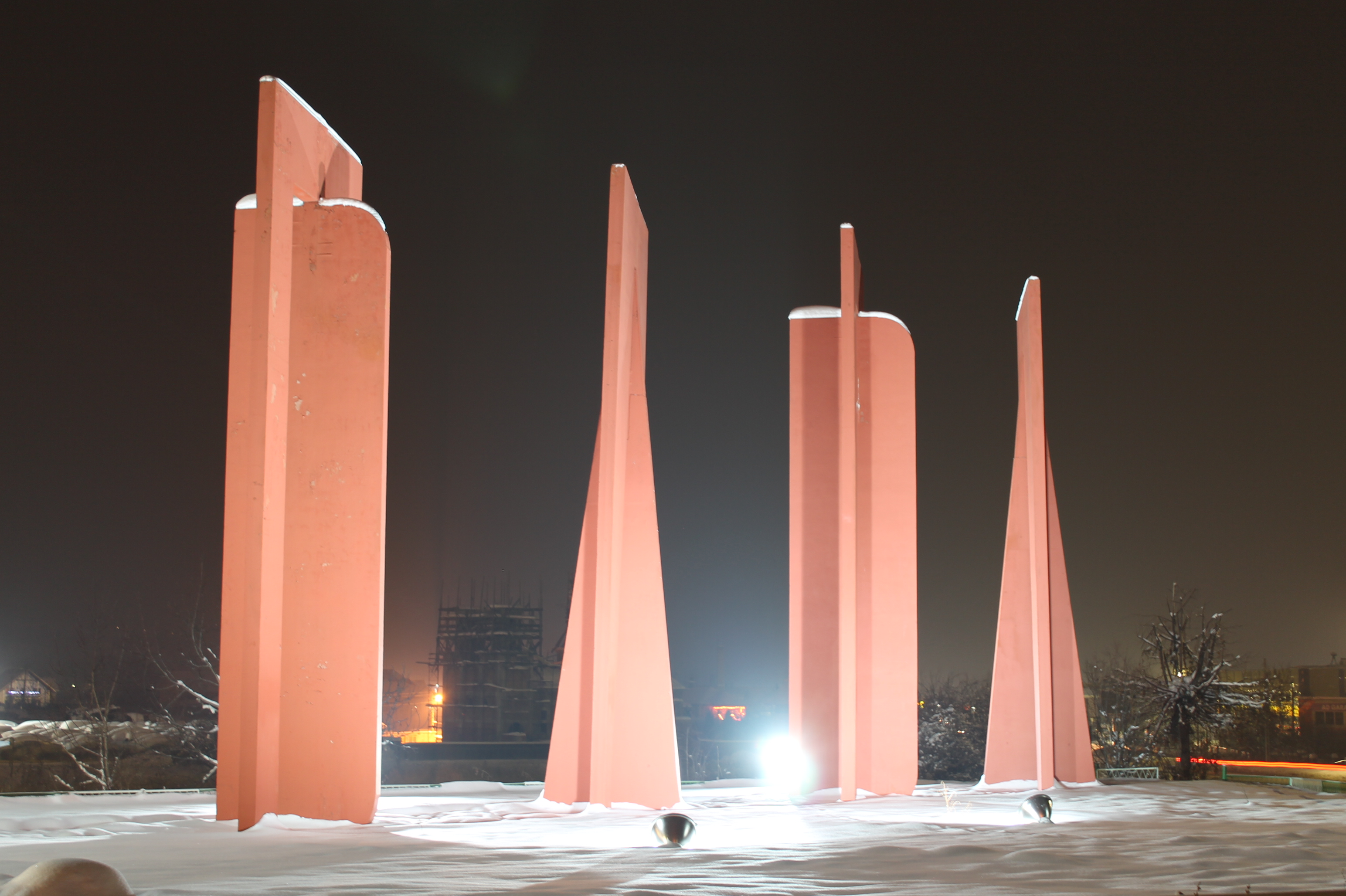 Noaptea Moinesti 001